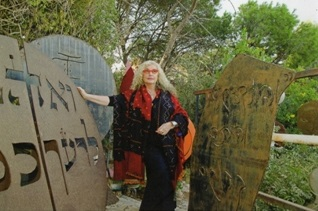 אביבה בגן הפסלים שבביתה 2016